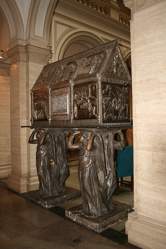 Svečano proglašenje i predstavljanje novih članova Hrvatske akademije znanosti i umjetnosti u Zagrebu